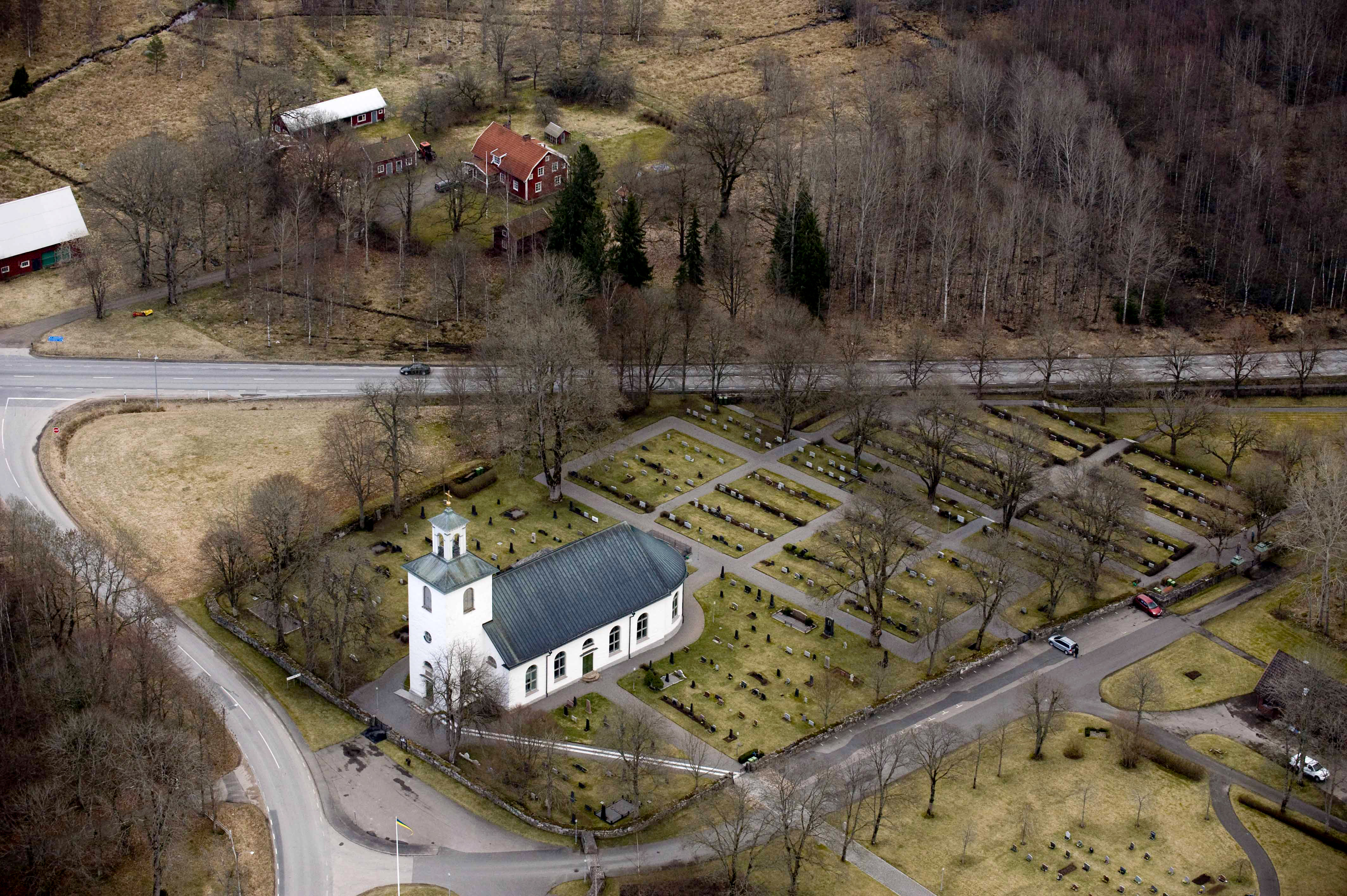 Voxtorps ka